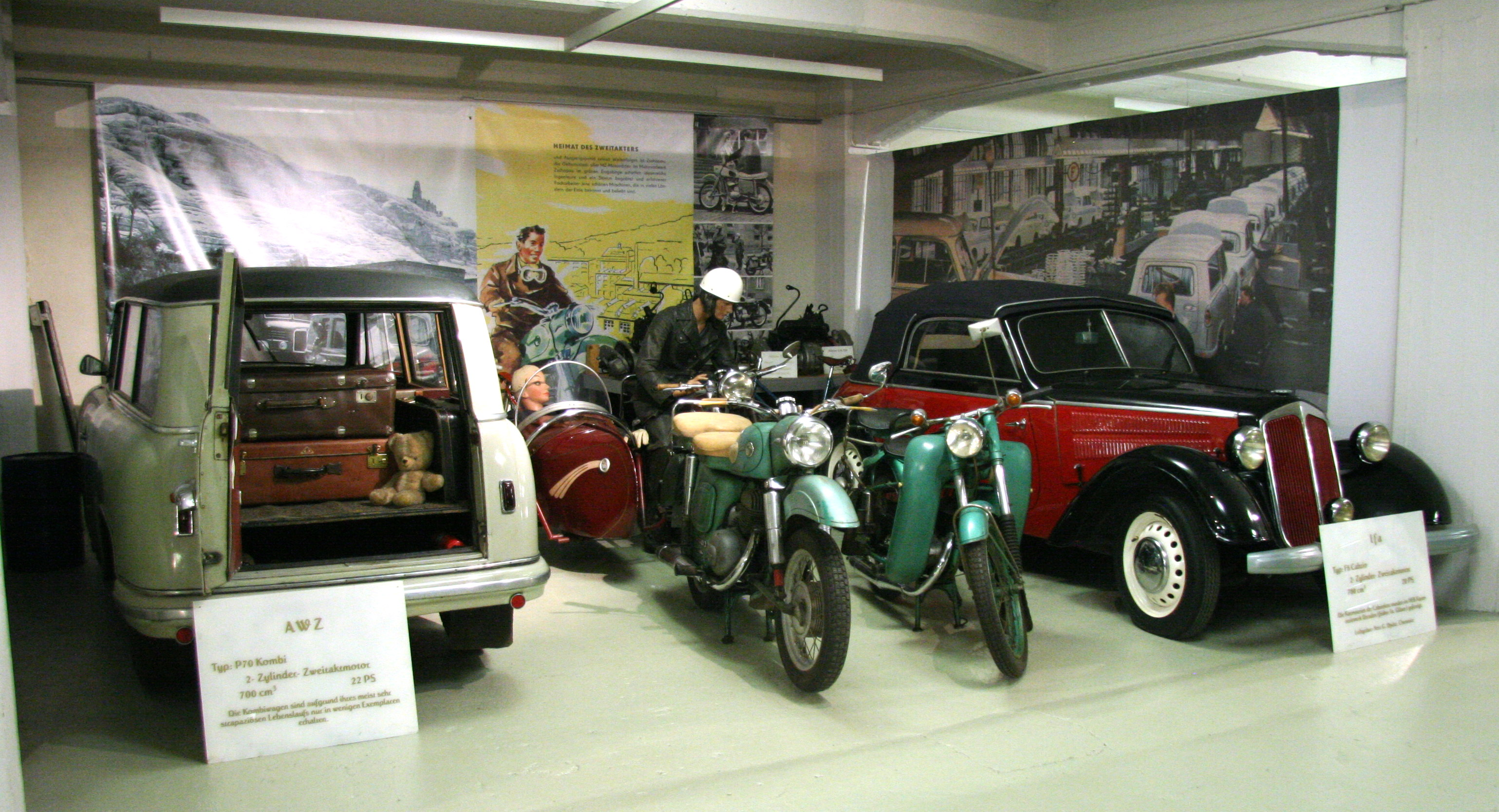 Exponate zum Fahrzeugbau in der DDR im Museum für sächsische Fahrzeuge in Chemnitz.